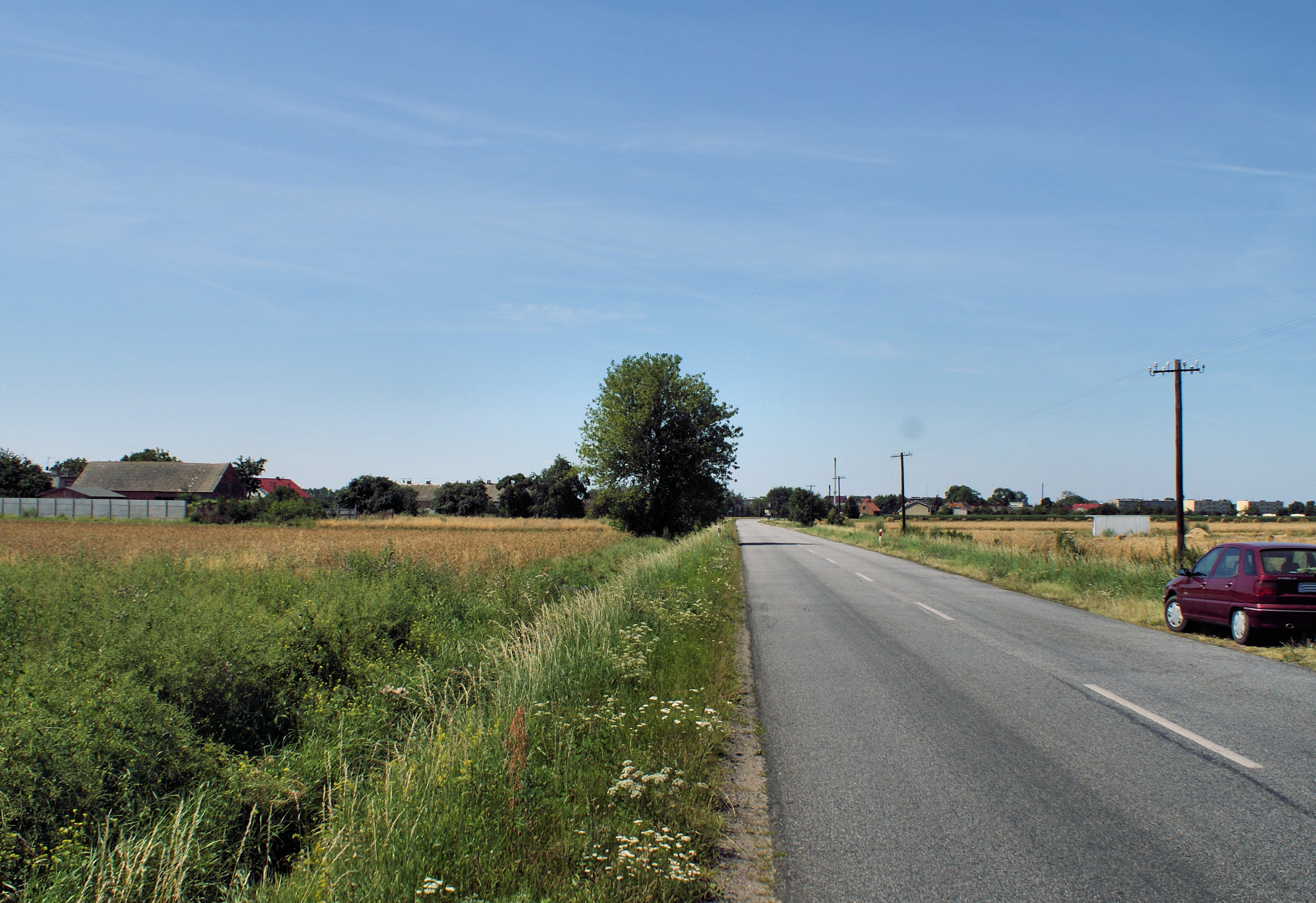 Radoszkowo Drugie, wieś w Polsce położona w województwie wielkopolskim, w powiecie śremskim, w gminie Książ Wielkopolski. Wjazd od strony zachodniej w okolicy Słonecznego Dworu.